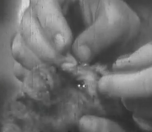 Juan (mono) (1969) preparándose para el despegue.